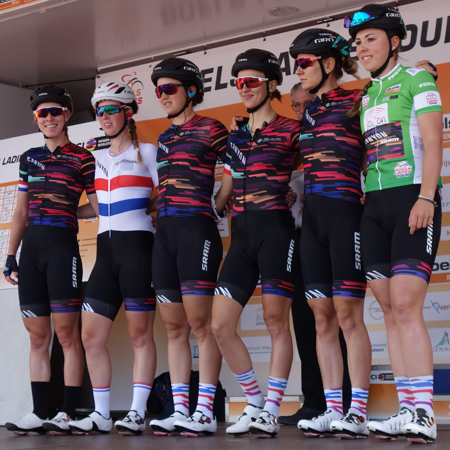 Canyon-SRAM bij de start van de eerste etappe van Stramproy naar Weert in de Boels Ladies Tour 2019